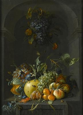 Still Life